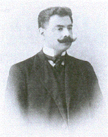 Георгиос Сагяксис